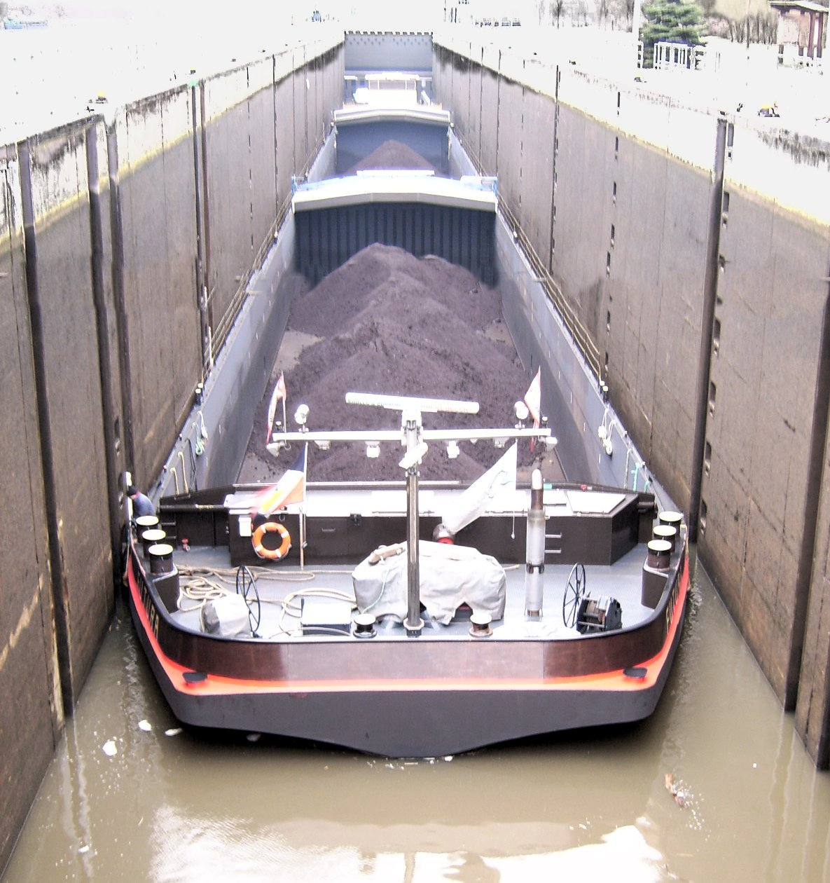 Dillingen Erzschiff